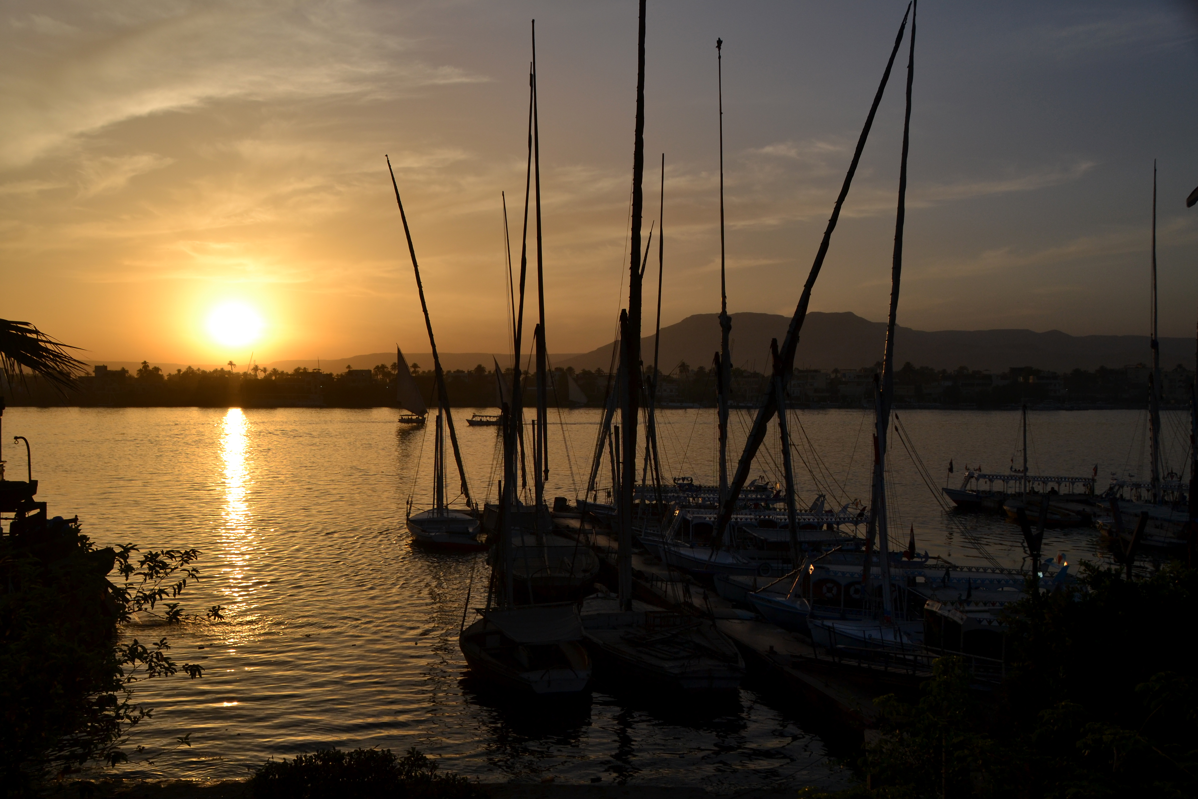 Sonnenuntergang am westlichen Nilufer (Mai 2019)